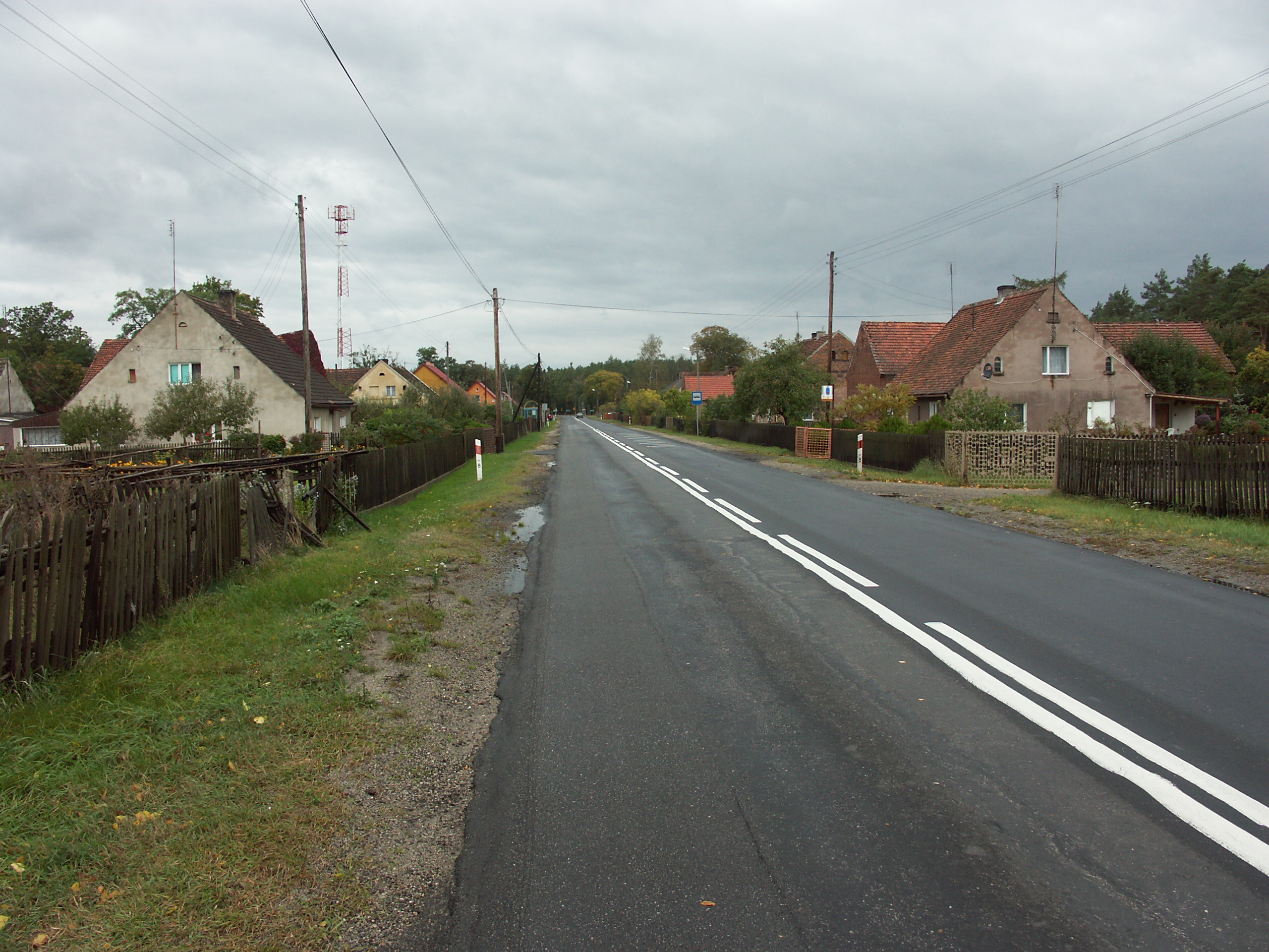 Spottischwaldau, Reihendorf von Osten gesehen, 2006